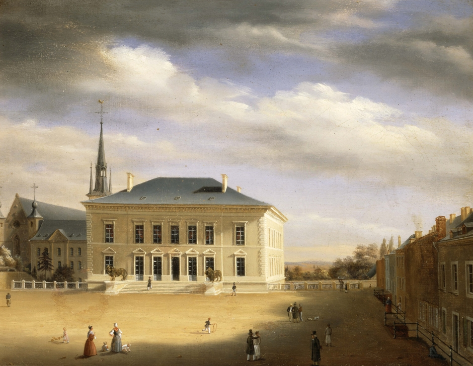 Jean-Auguste Marc (1818-1886): Hôtel de Ville de Luxembourg (1837)